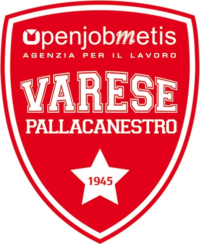 Logo Pallacanestro Varese OPenjobmetis